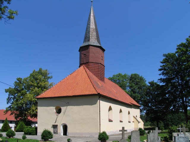 Żeliszów - rzymskokatolicki kościół parafialny p.w. św. Jana Nepomucena, poł. XIV, 1600, XIX